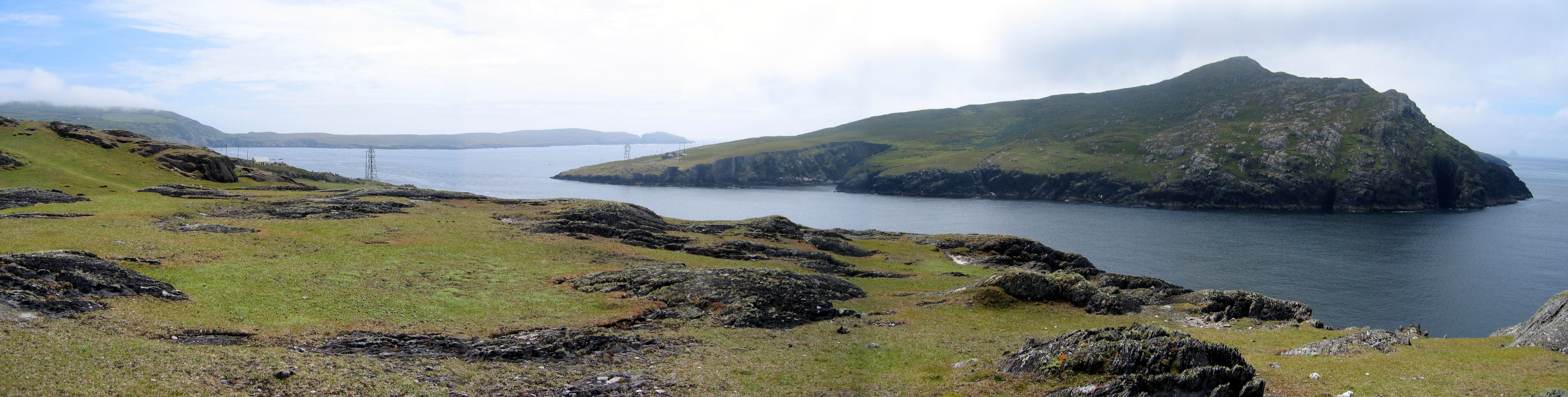 Panorama Dursey Island